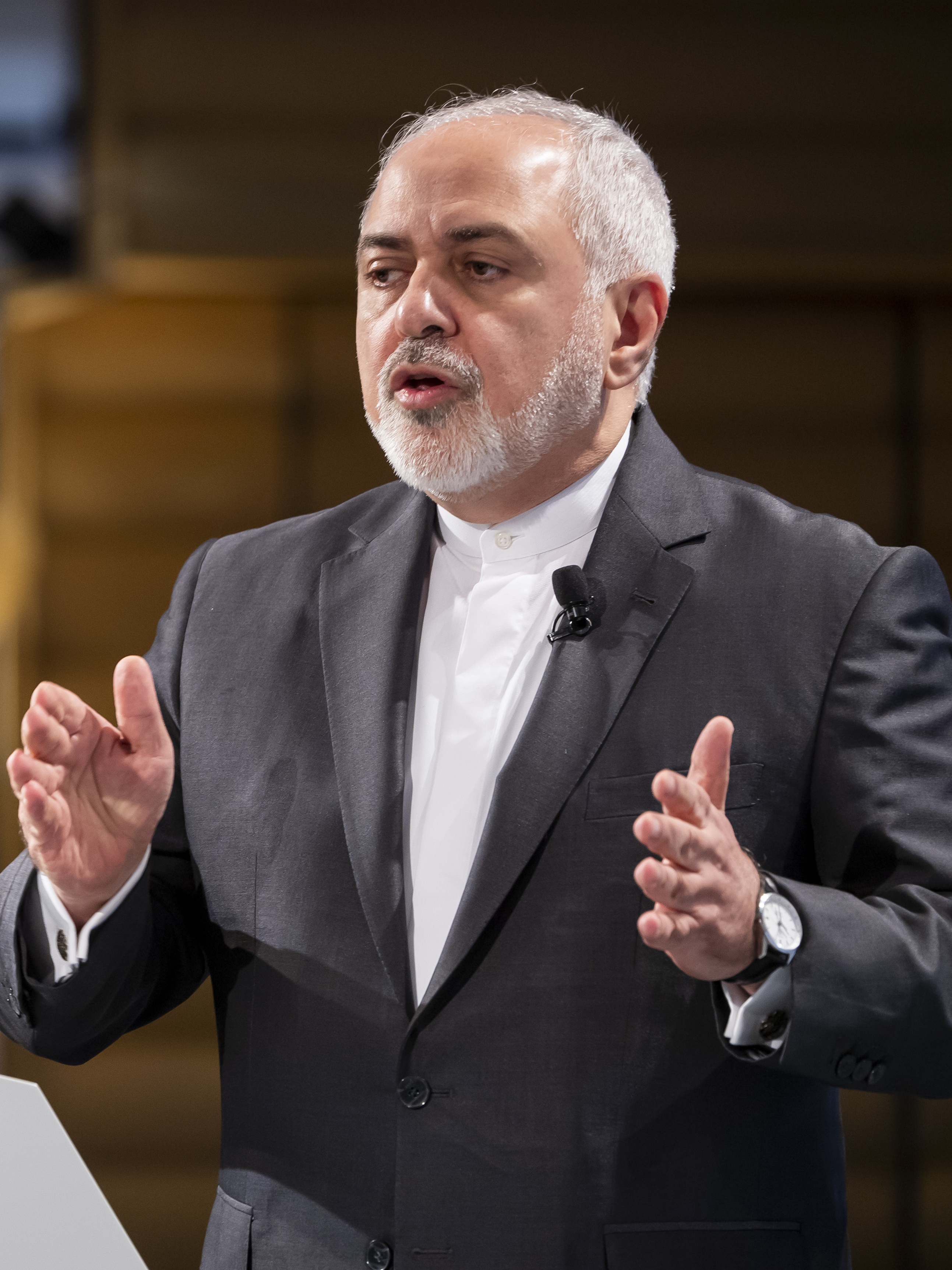 Mohammad Javad Zarif während der Münchener Sicherheitskonferenz 2019